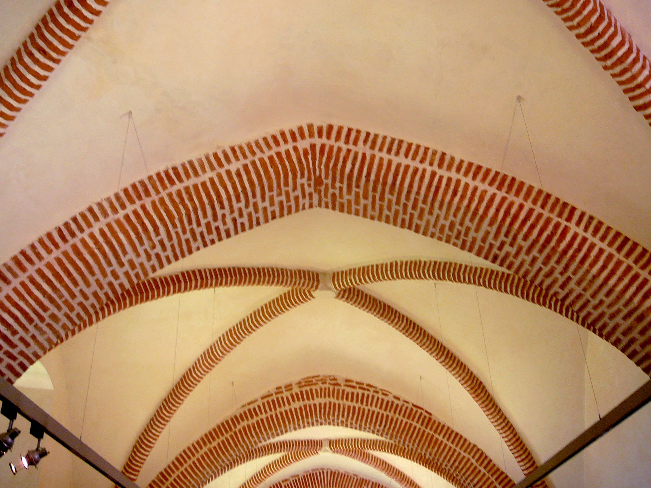 Palais de la Berbiemusée Toulouse-Lautrec (ClasséClassé) .